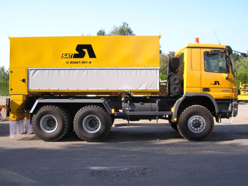 Bindemittelstreuer zum dosieren und verteilen von hydraulischem Bindemittel im Straßen- und Erbau